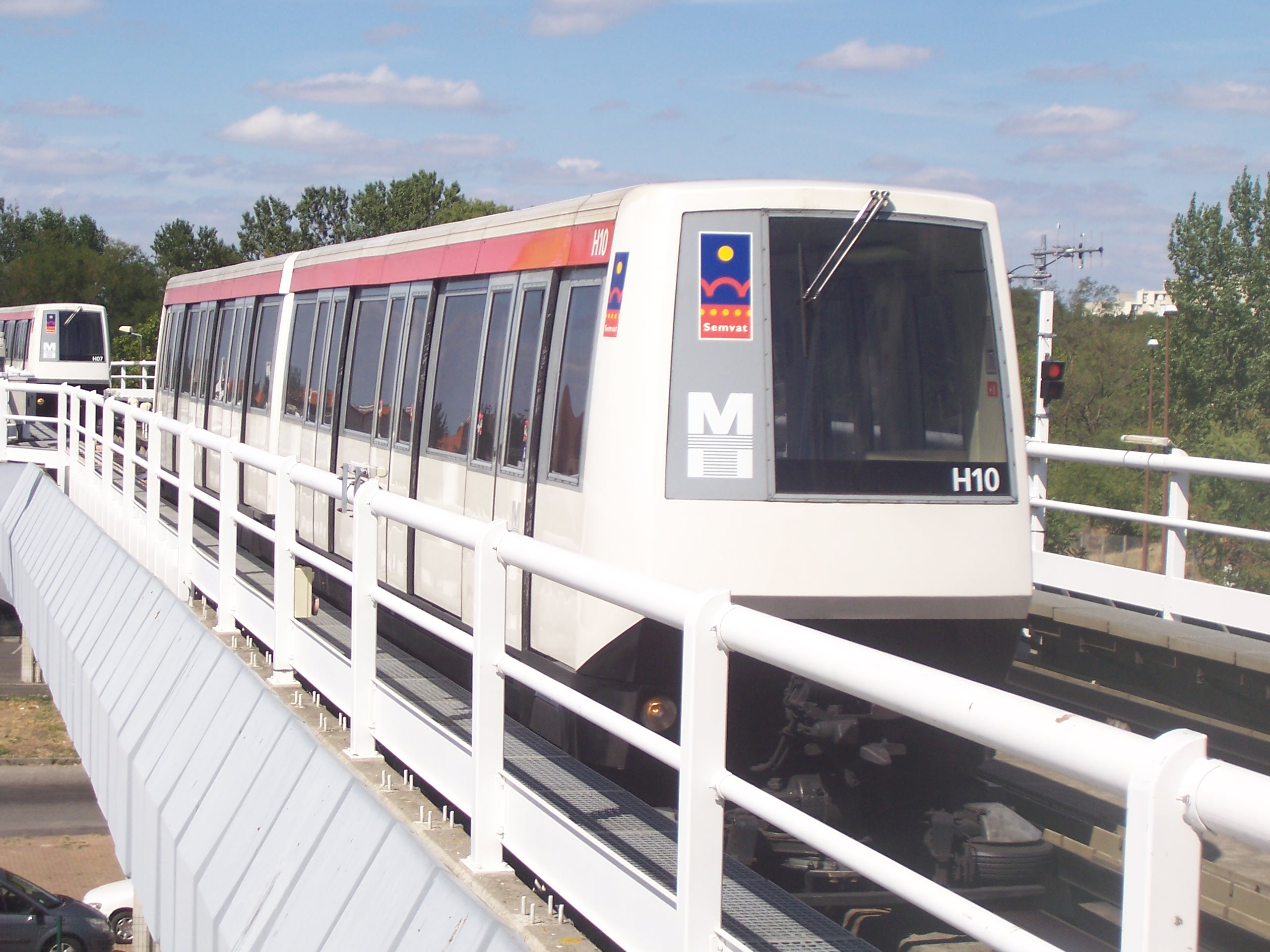 Metro ligne A Toulouse